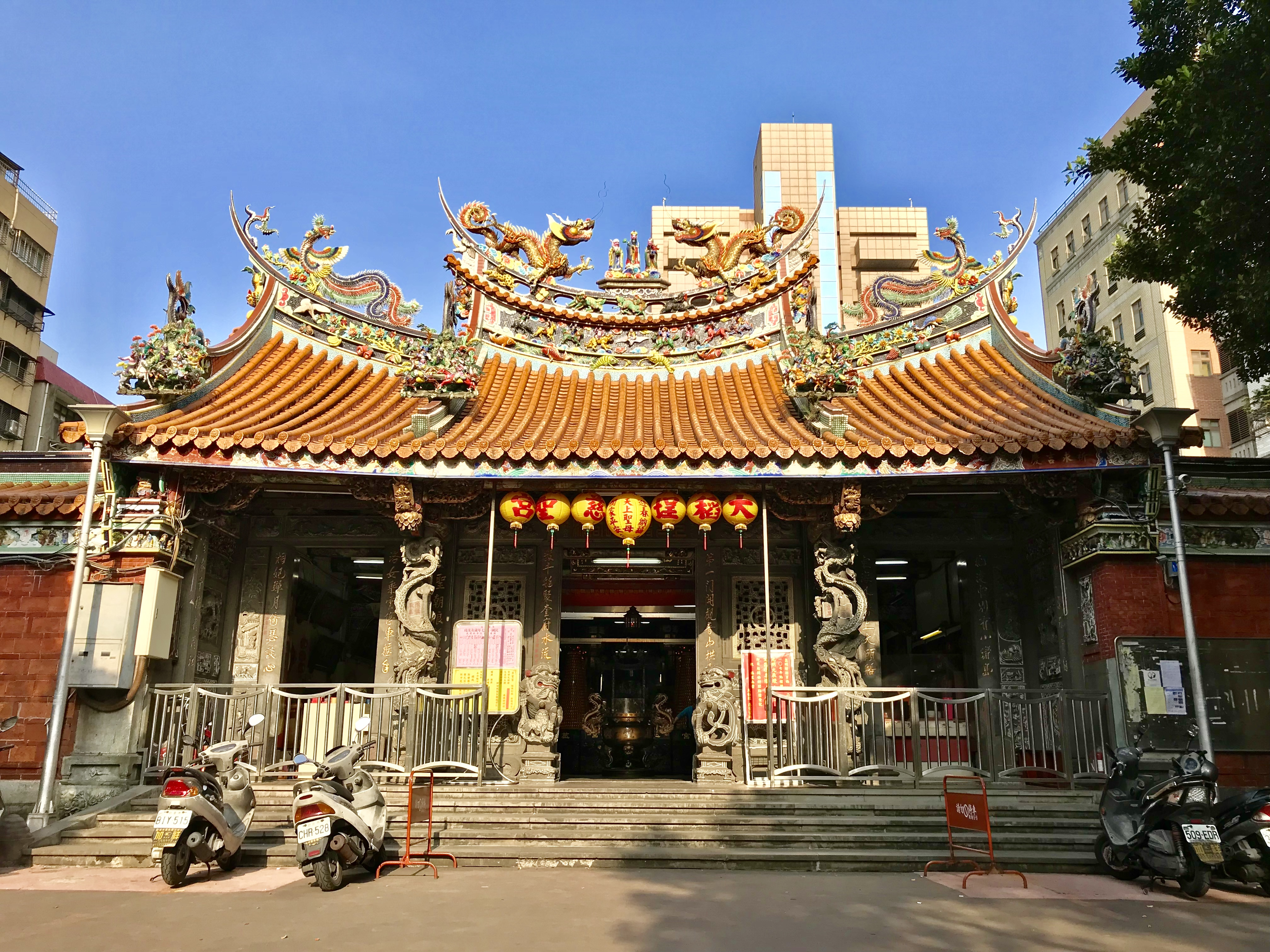 中文（台灣）: 大稻埕慈聖宮正面照